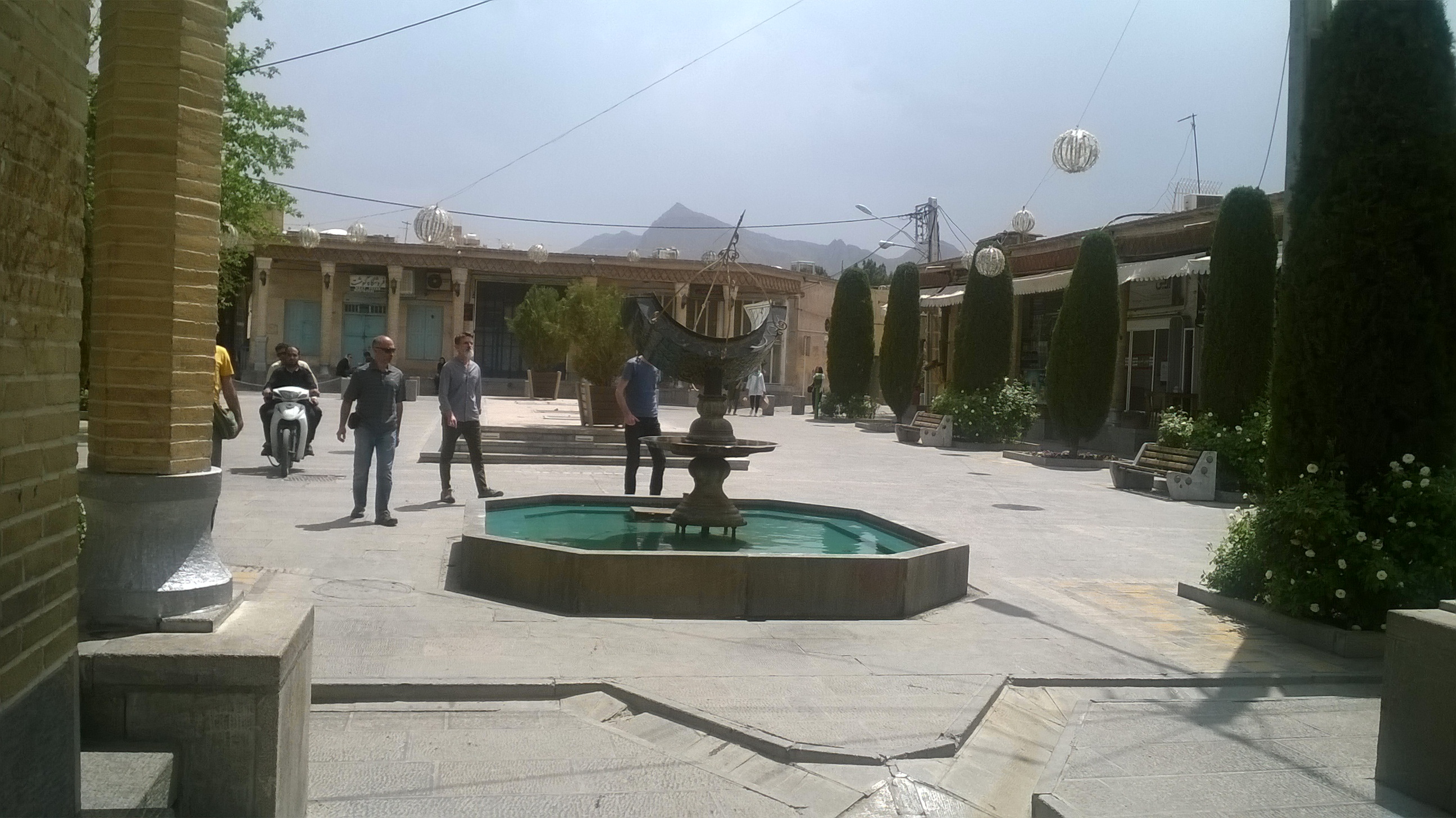 Jolfa-bazar بازار جُلفا